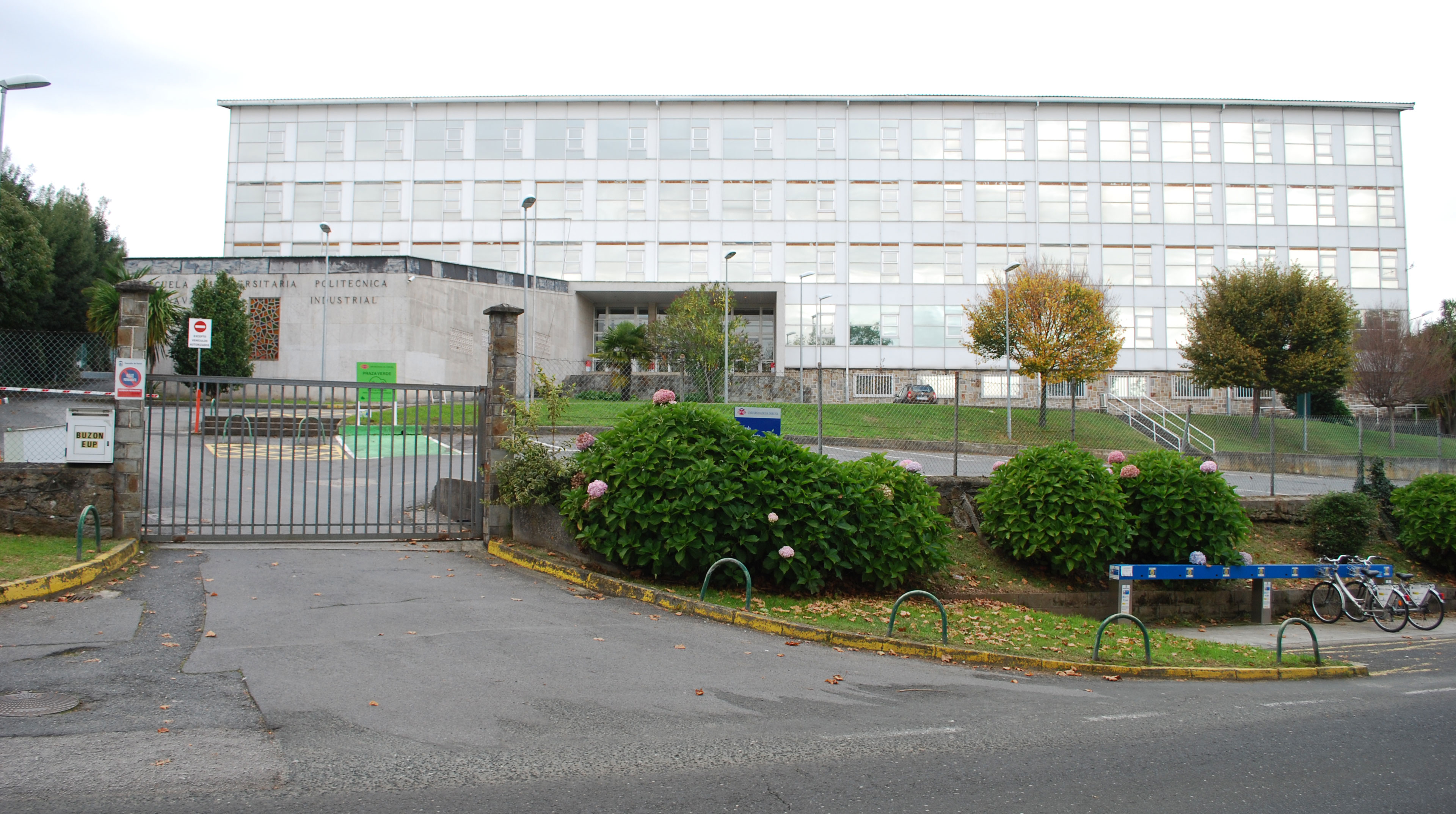 Escola Universitaria Politécnica de Serantes, Campus de Ferrol Universidade da Coruña Galiza Spain